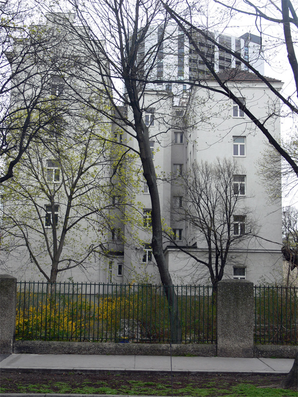 Männerwohnheim Meldemannstraße 27, Wien, Österreich